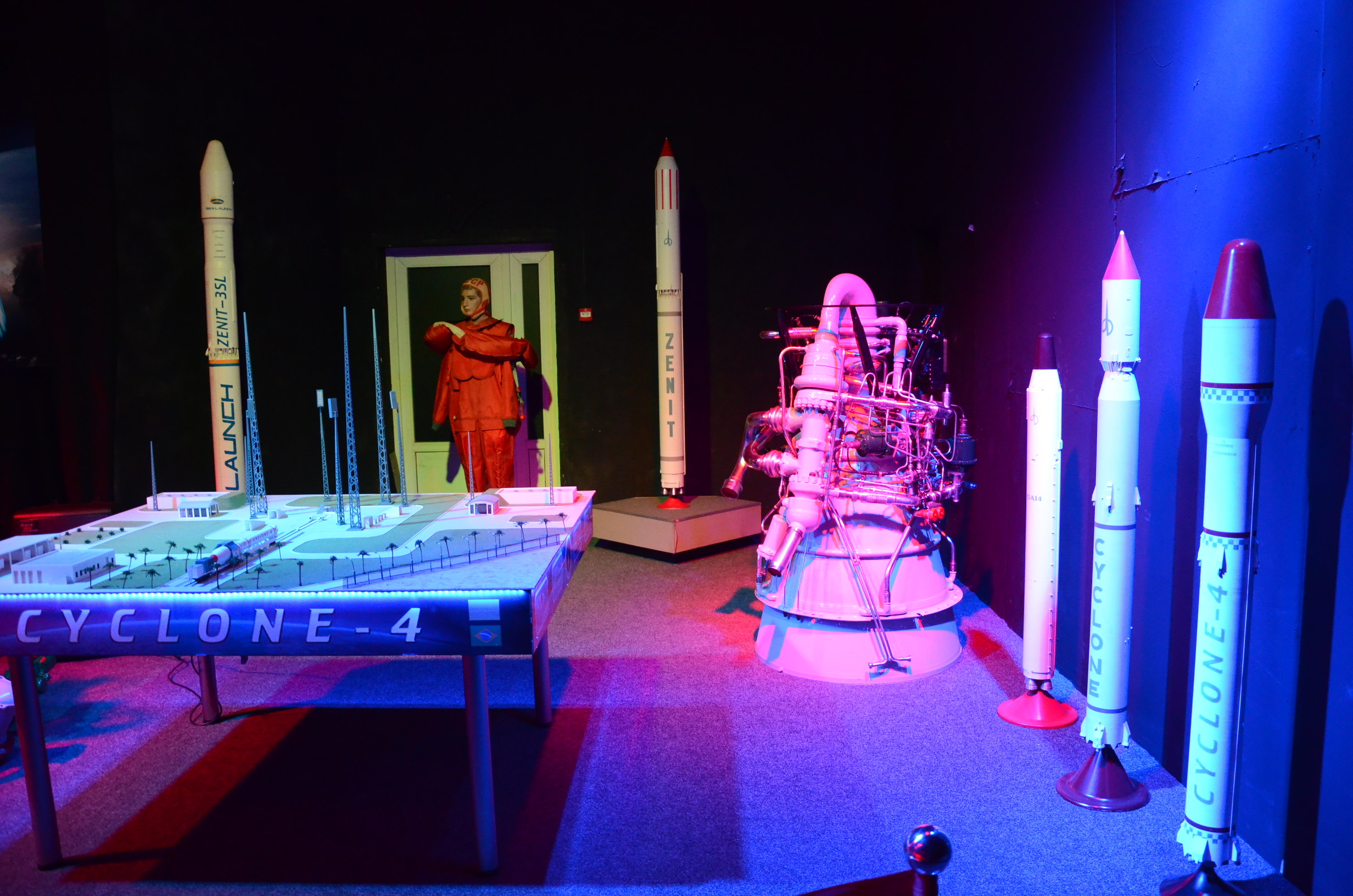 airspace museum